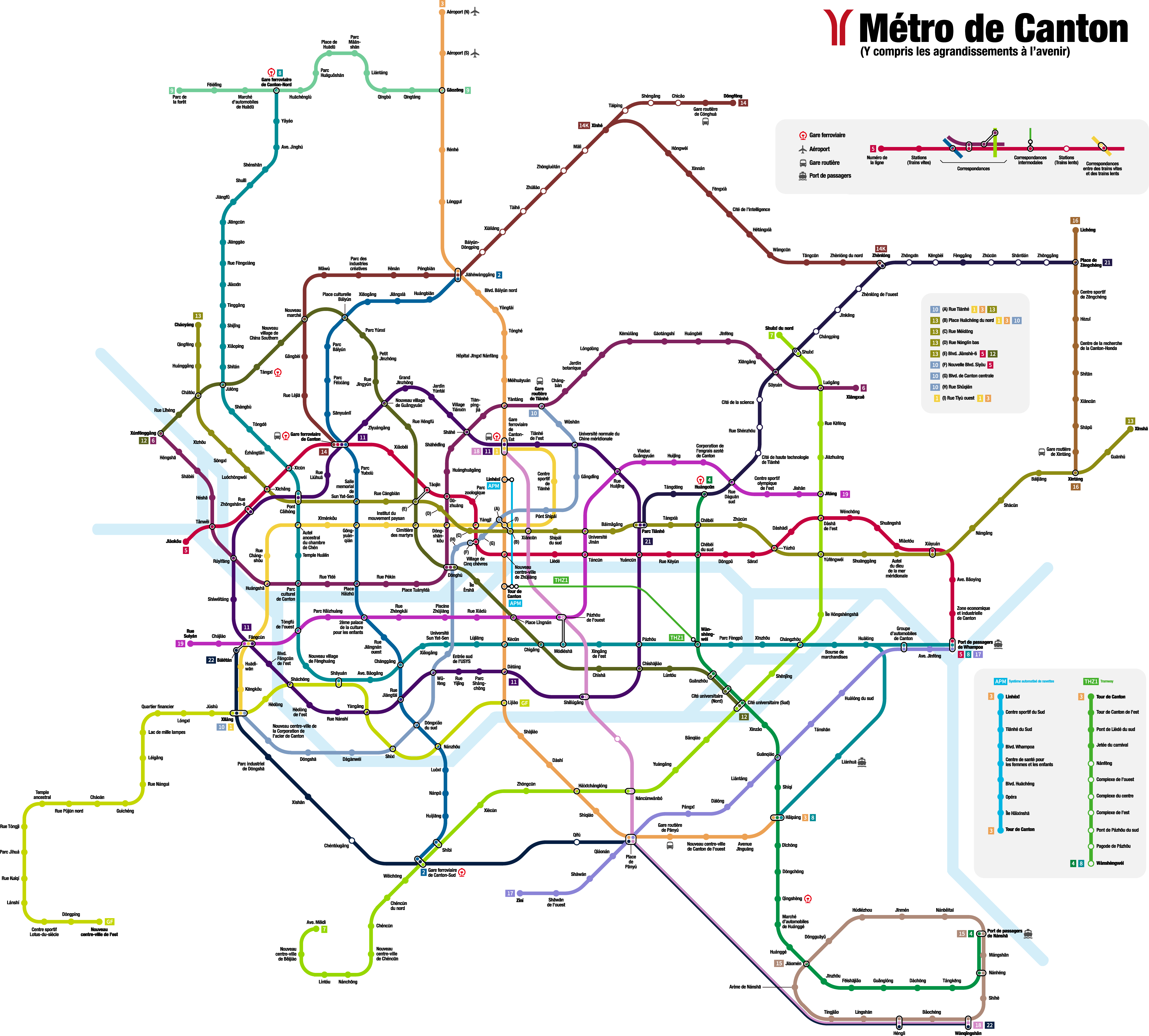 Le plan du Métro de Canton, y compris les agrandissement à l'avenir. Auteur: Antilovsky. Traduction française: Cedric_tsan_cantonais. 粵語: 廣州地鐵未來線路規劃（法文版）。 原作：Antilovsky. 法文翻譯：Cedric_tsan_cantonais.